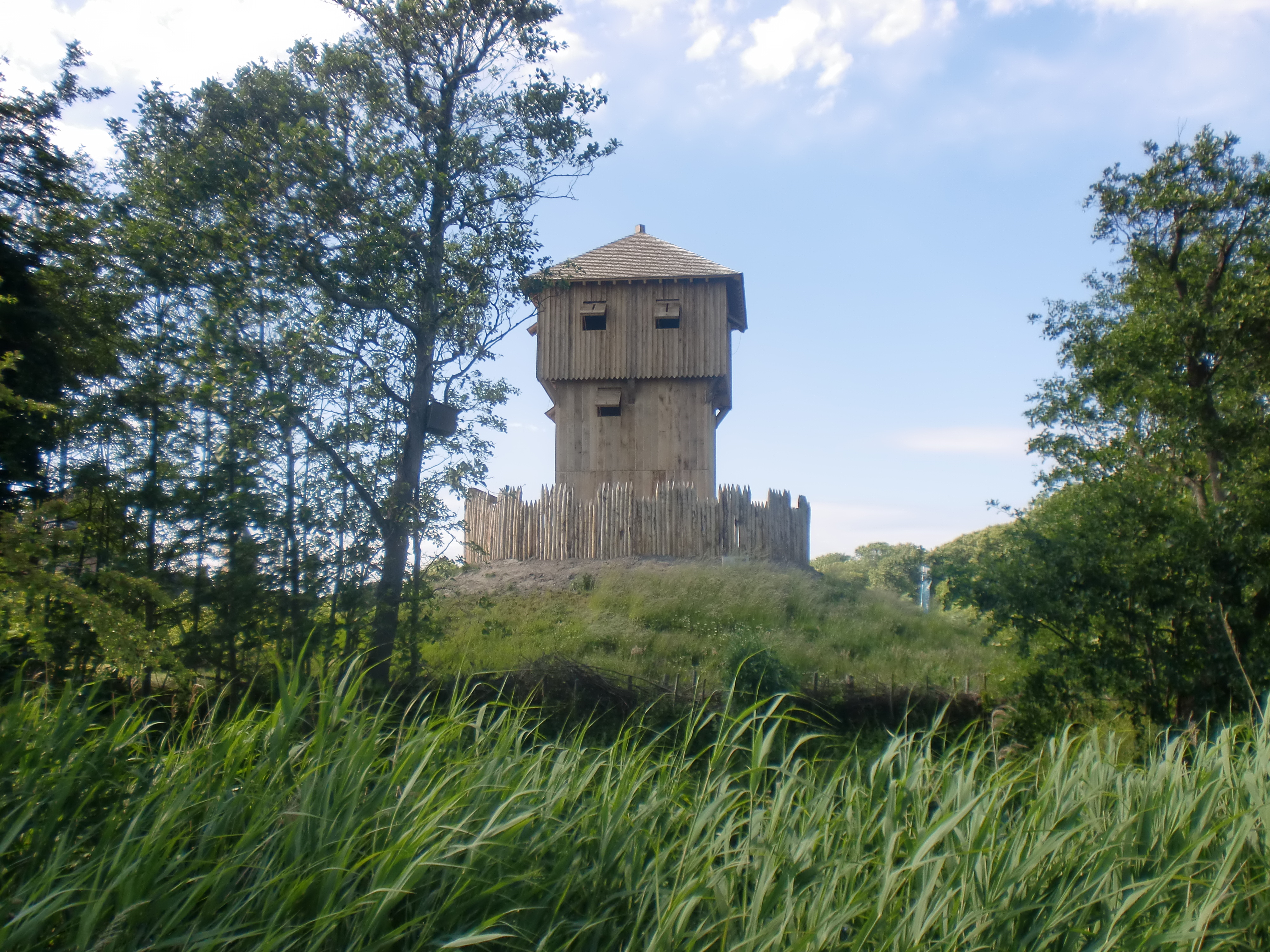 Reconstructie van een Mottekasteel op het terein van kasteel Westhove, Oostkapelle, Zeeland